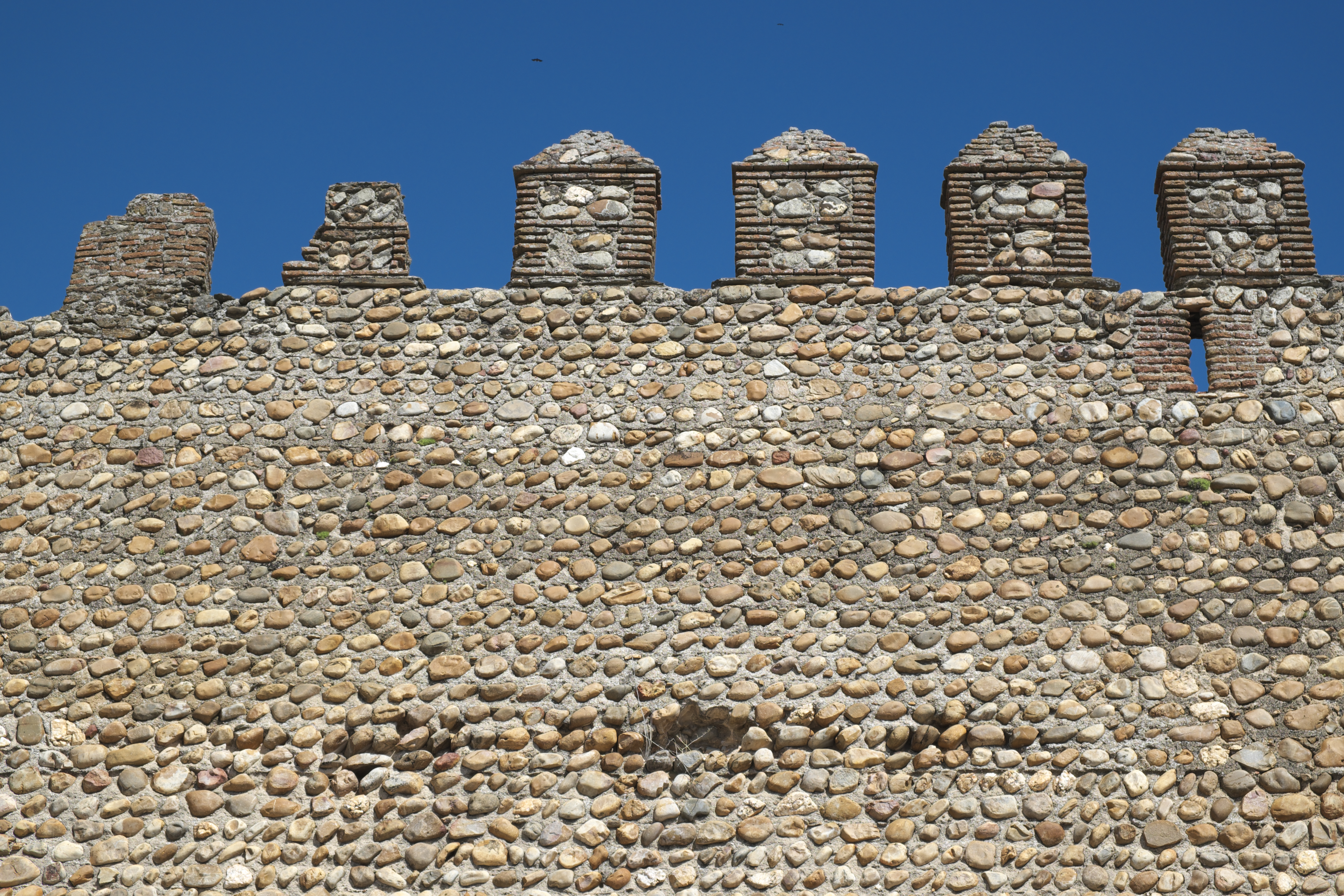 Stadtmauer in Galisteo in der Provinz Cáceres (Extremadura/Spanien), Zinnen